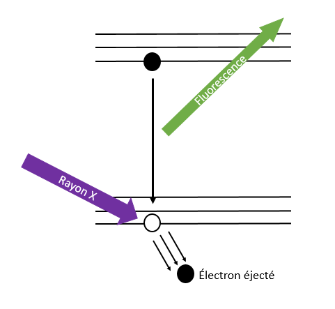 Schéma simplifié du phénomène de la fluorescence suite à l'exposition d'un atome à des rayons X